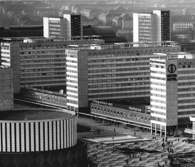 Dresden, Prager Straße, Neubauten, Hotels ADN-ZB Häßler 21.3.1975 Dresden: Moderne Geschäfte und Gesellschaftsbauten, zu denen das Kino "Panorama" (vorn links) gehört, bestimmen das Anlitz der Prager Straße in Dresden.